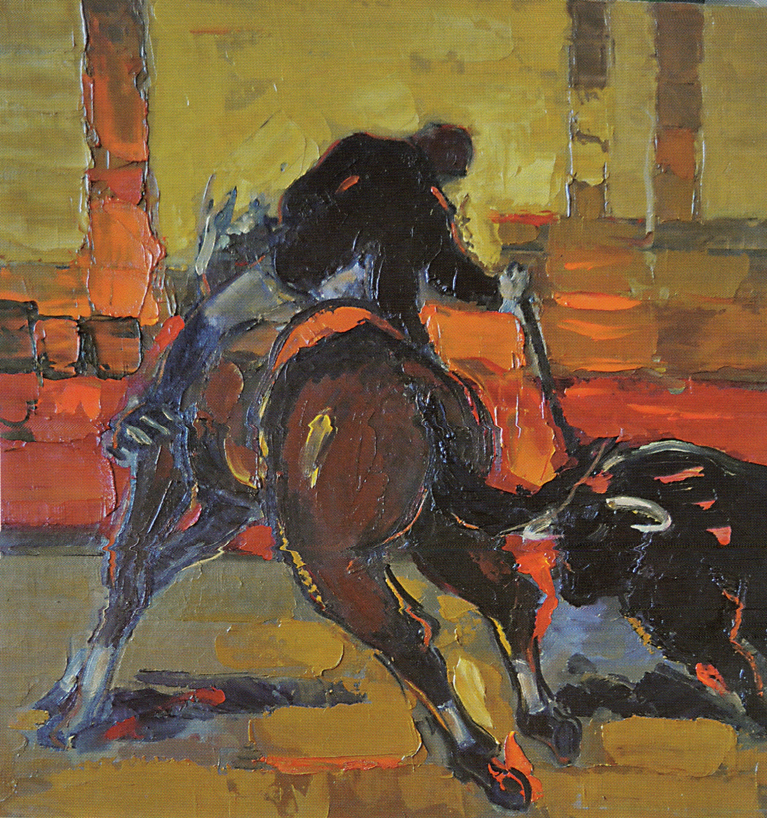 Sorin Adam - Corida 2, 60x60, u/p/c